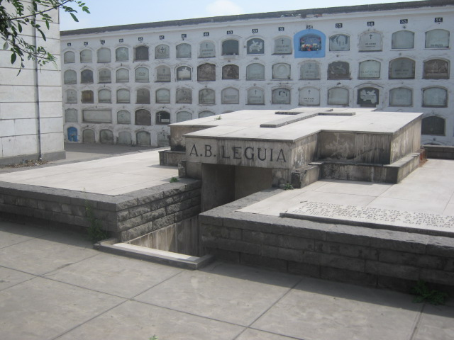 Tumba Leguia